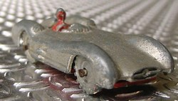 Morestone of Budgie modelauto van een Mercedes-Benz W196